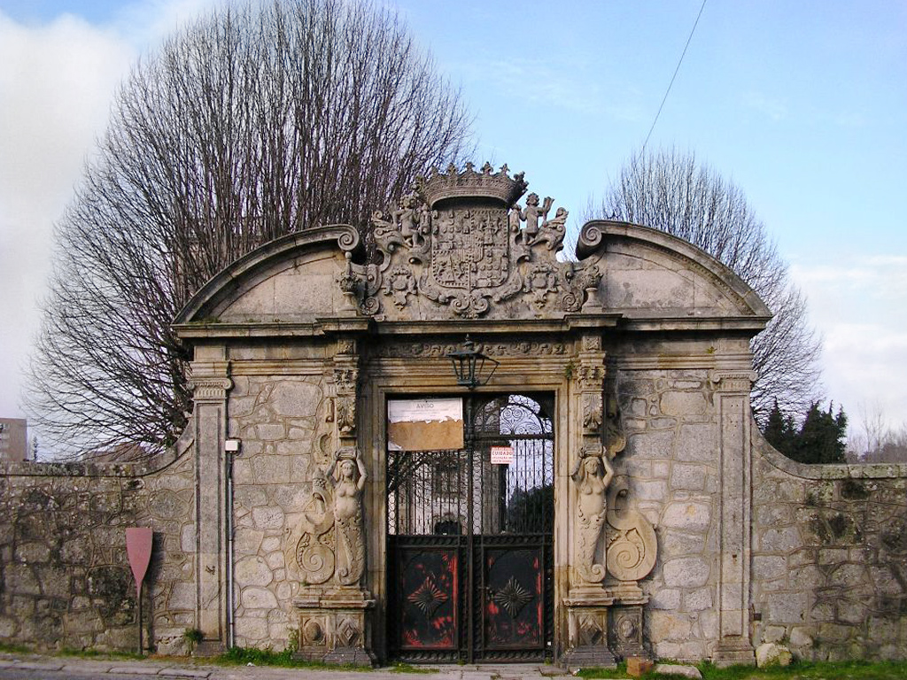 "Quinta da Prelada" main gate in Porto, Portugal. Author: Manuel de Sousa